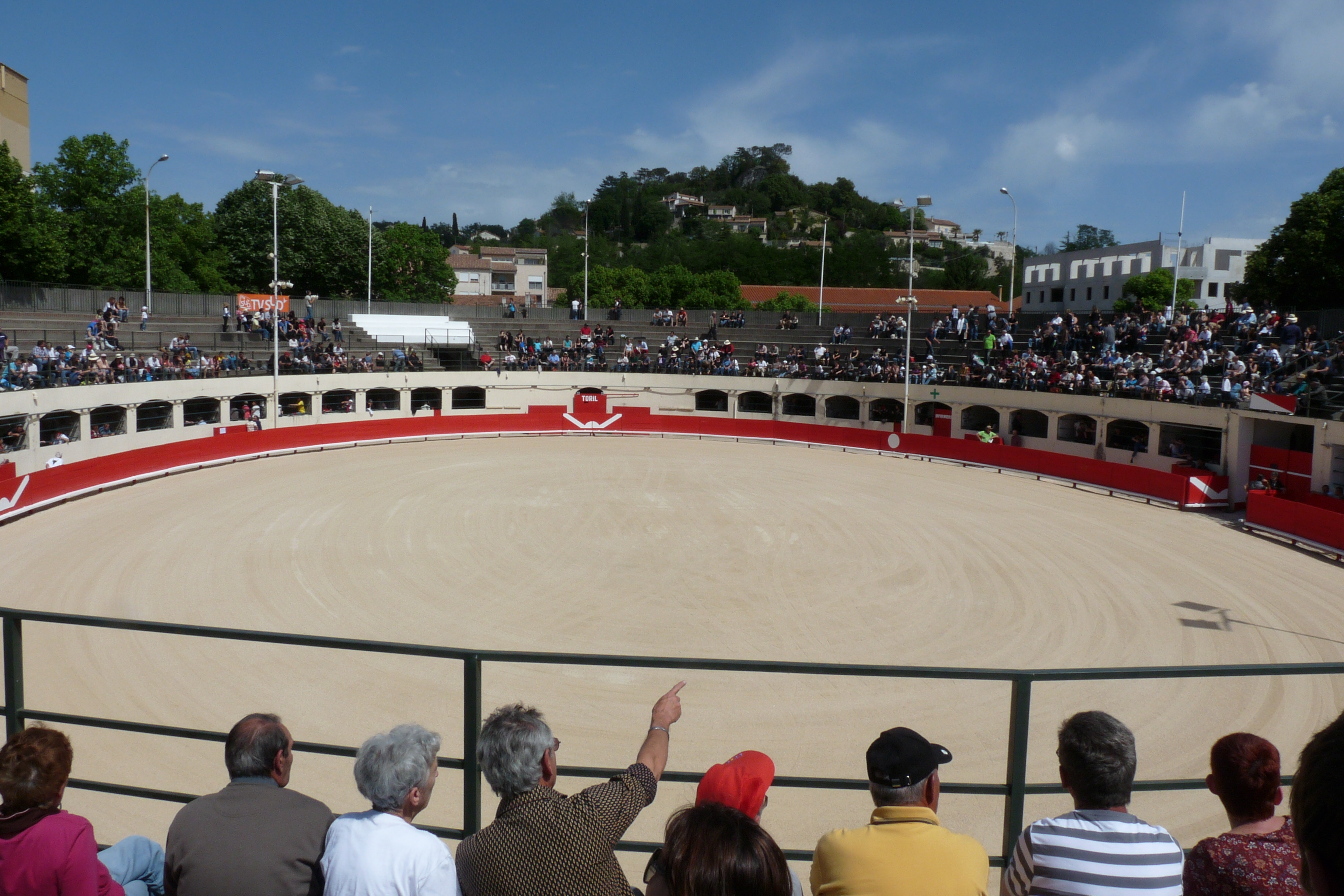 Photo de l'intérieur des arènes d'Alès